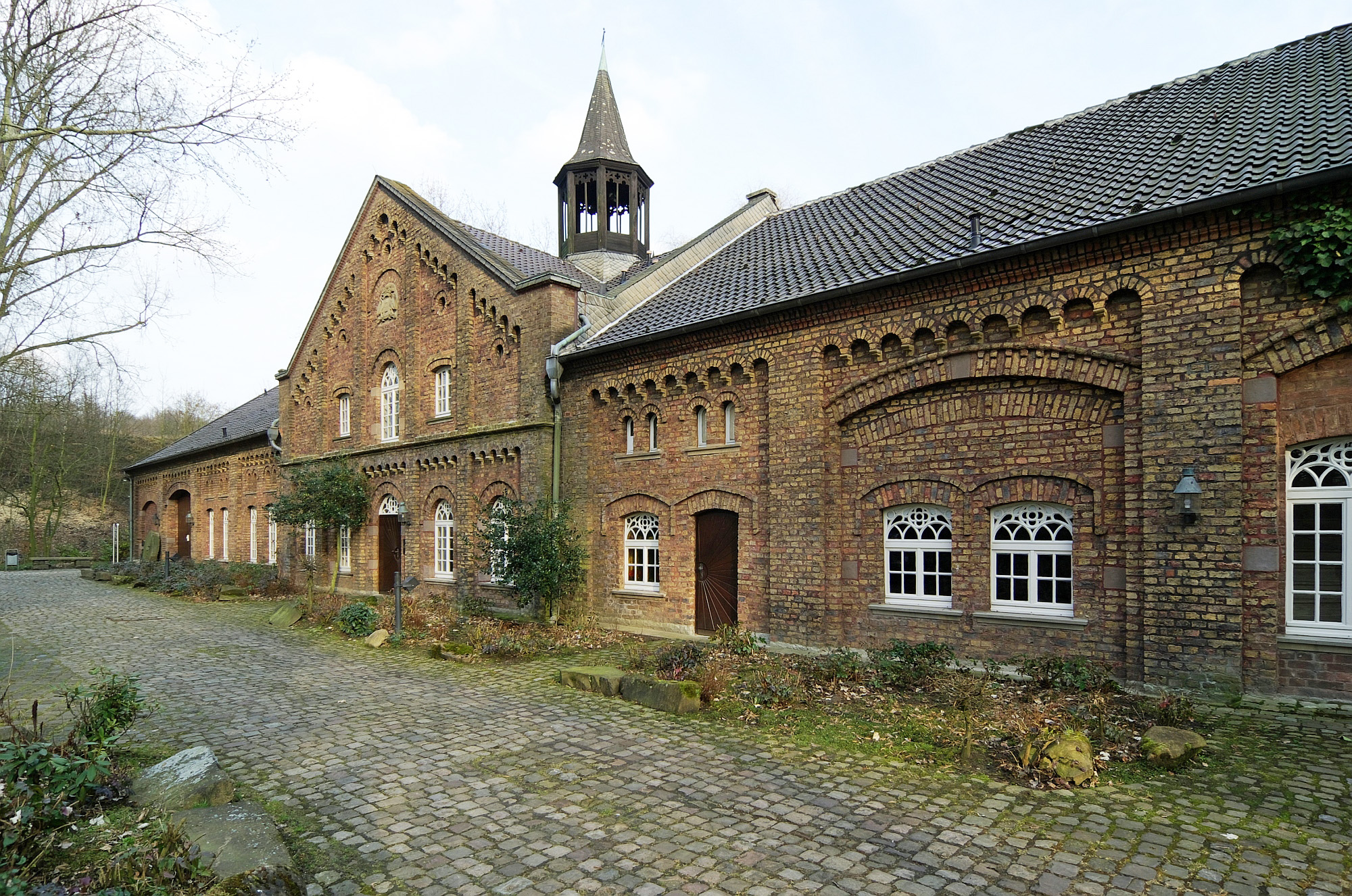 Museum der Stadt Lünen, untergebracht in den ehemaligen Wirtschaftsgebäuden des Schlosses Schwansbell